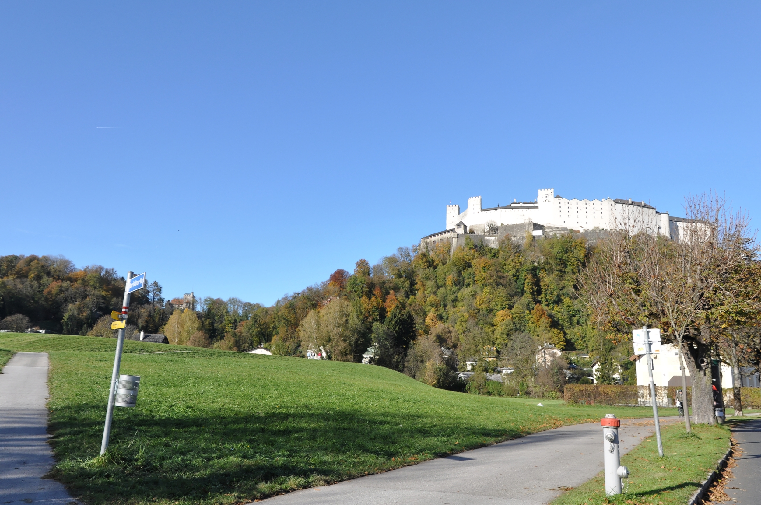 Salzburg Wikipedia im Landtag – Salzburg 31. Oktober 2012 in SalzburgDieses Foto wurde im Rahmen des Projektes „Wikipedia im Landtag“ erstellt.